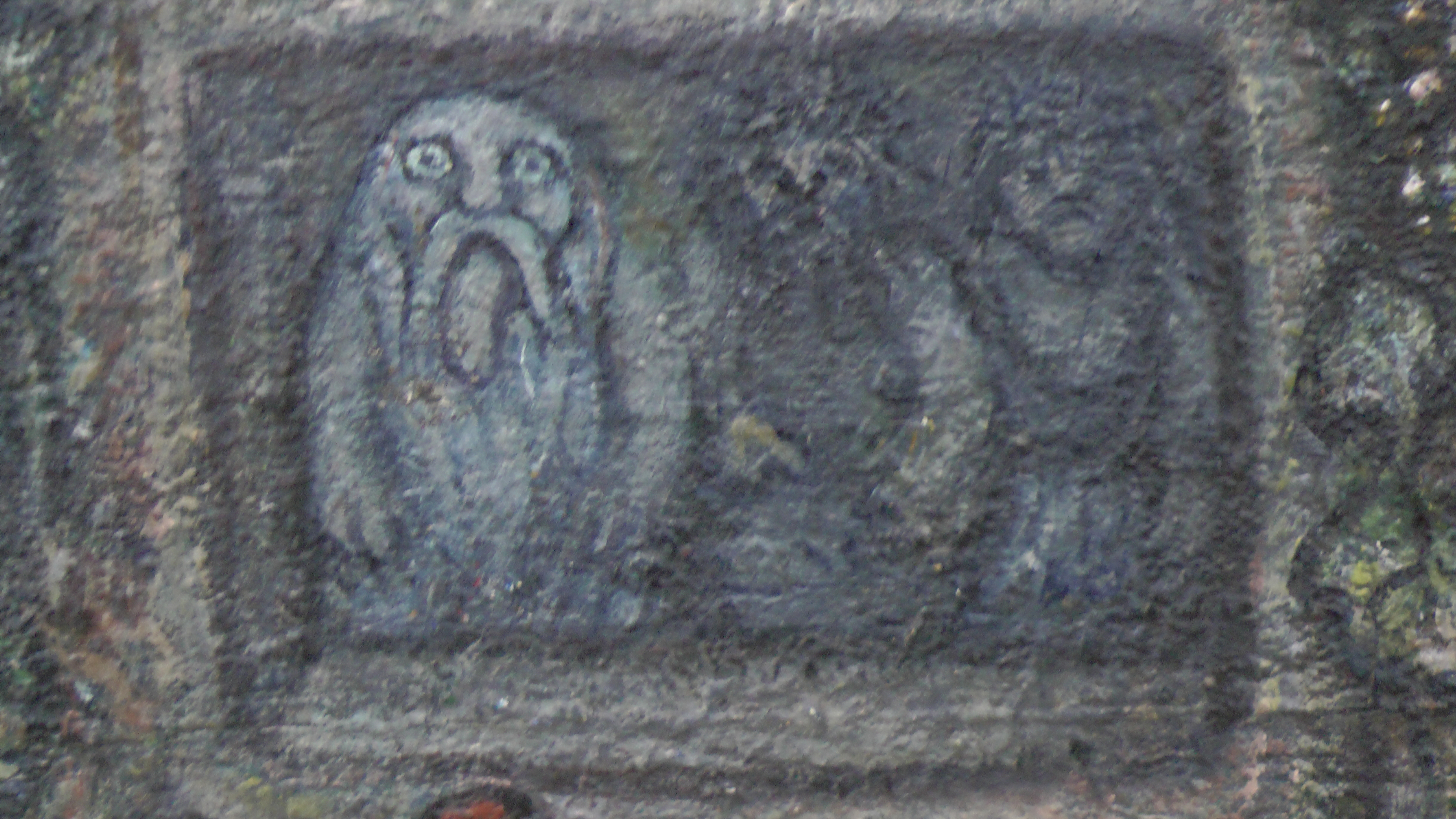 Житные духи на картине Ефима Честнякова "Коляда"